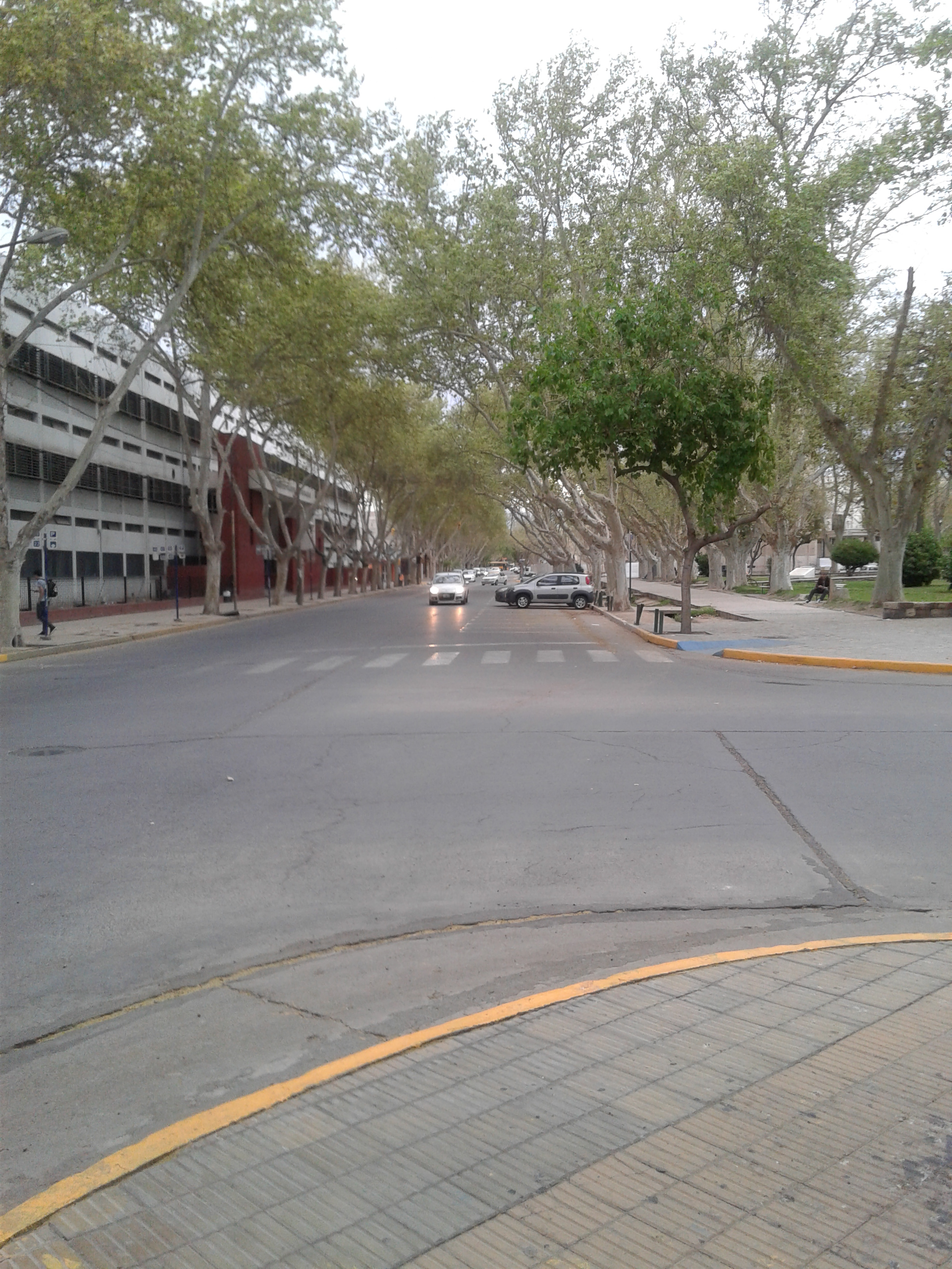 Vista de calle Mitre, ciudad de San Juan, provincia de San Juan, Argentina.